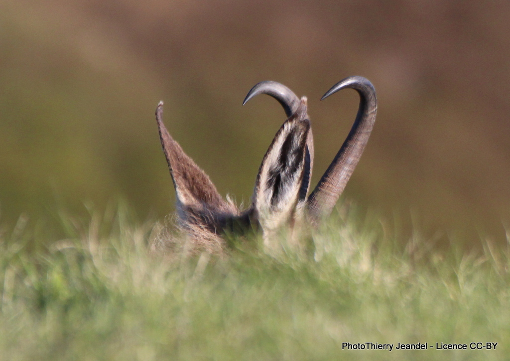 On m'a obligé à décrire cette image mais moi je n'ai rien à dire !